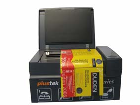 Plustek buchscanner OpticBook 4600